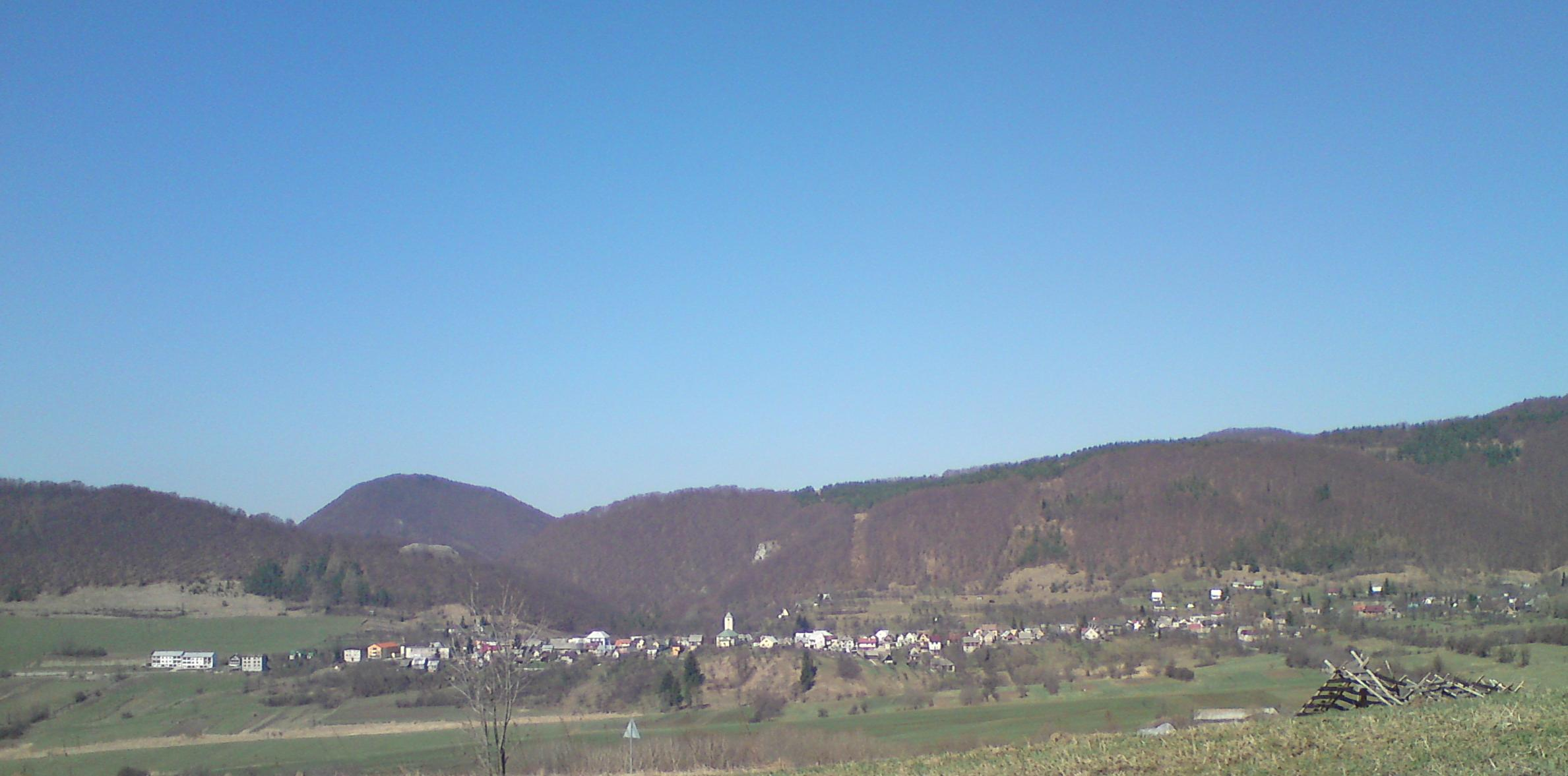 Pohľad na Zliechov od východu - z rázcestia pod Javorinkou